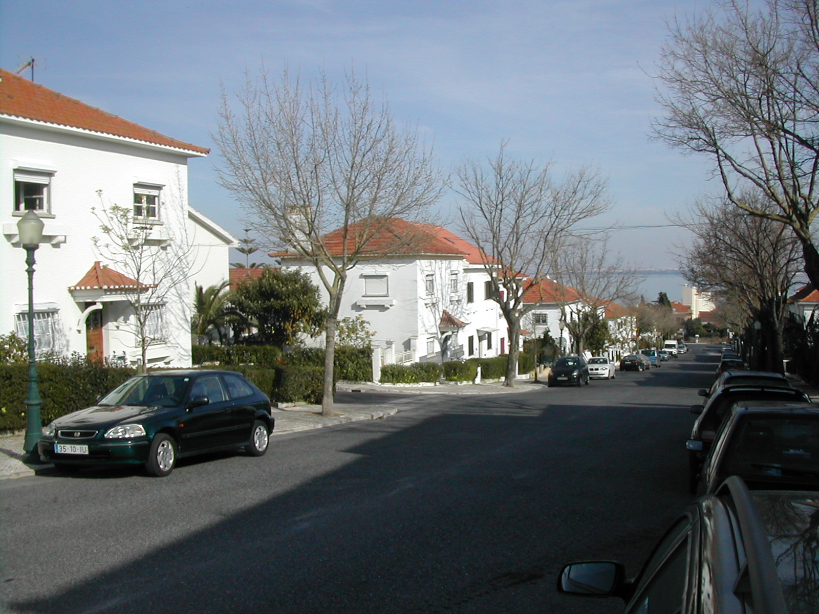 Rua D. José de Bragança, Bairro Madre de Deus, Lisboa